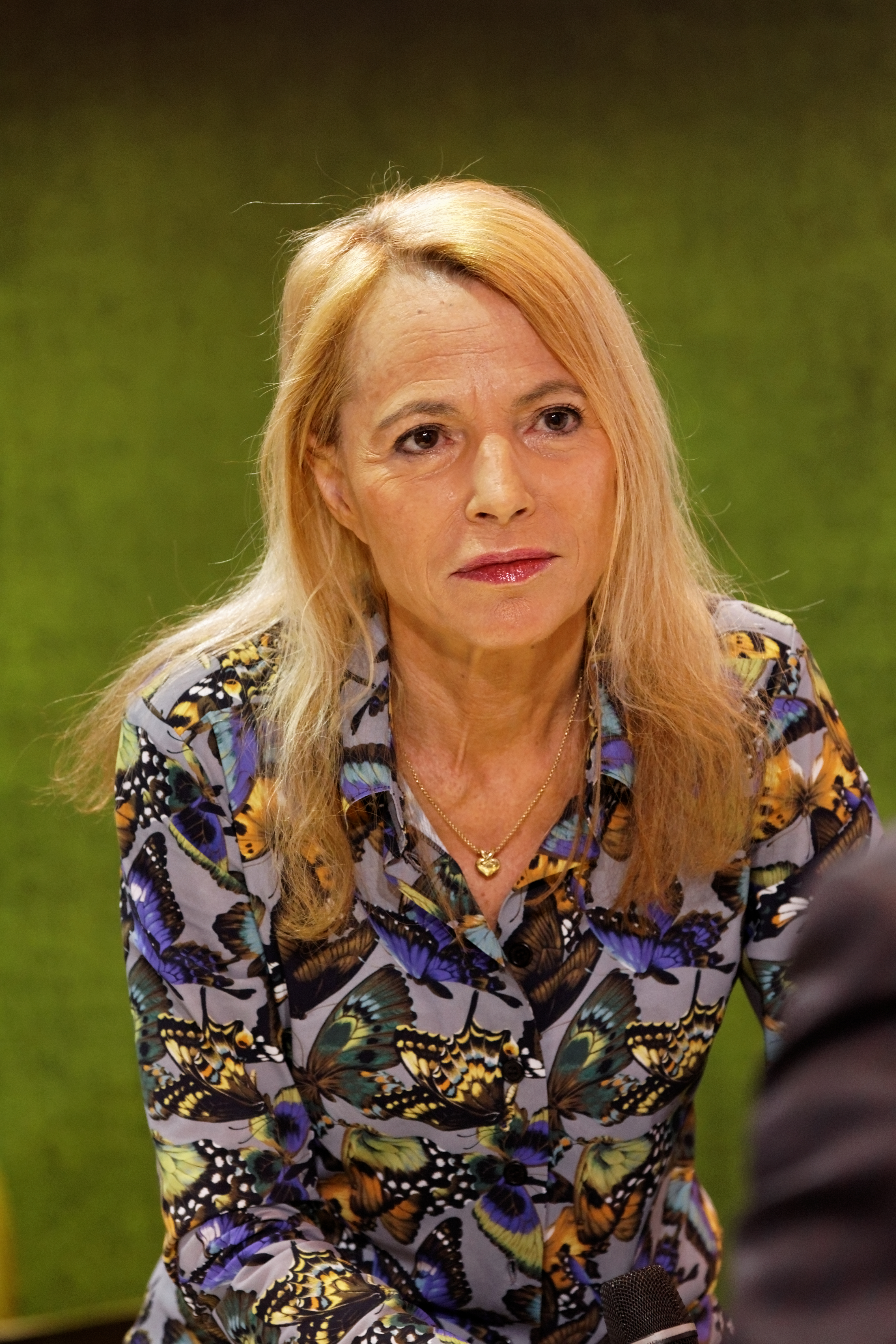 Laure Adler enregistrant son émission littéraire, "Tropismes"